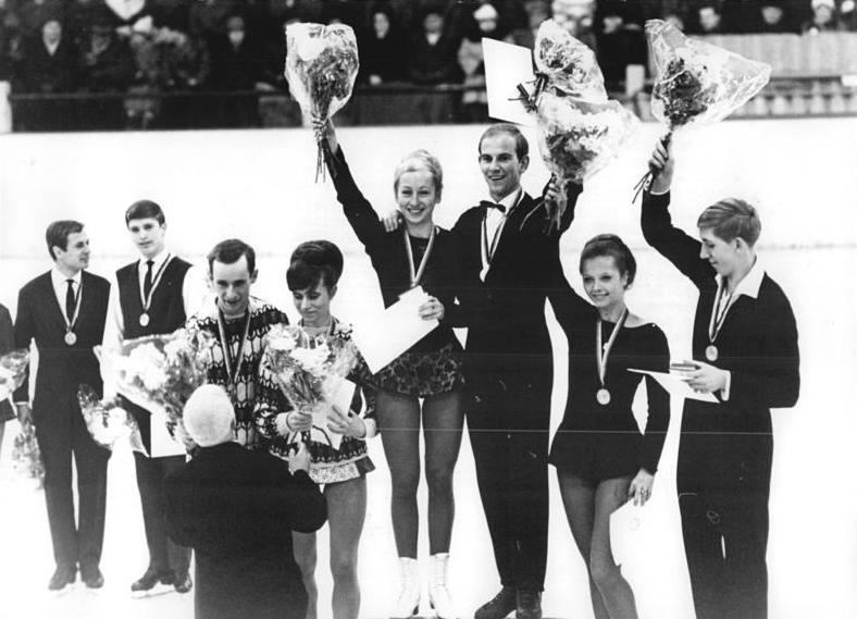 Eiskunstläufer, DDR Zentralbild Kohls Ma 10.1.1966 Karl-Marx-Stadt: Deutsche Meisterschaften im Eiskunstlaufen am 9.1.1966 in der Karl-Marx-Städter Eissporthalle. Siegerehrung im Paarlauf: Vordergrund vlnr: Klaus Wasserfuhr und Renate Rössler (TSC Berlin, 3. Platz), Heidi Steiner und Heinz-Ulrich Walther (SC Dynamo Berlin, Deutsche Meister) und Brigitte Weise und Michael Brychczy (SC Dynamo Berlin, 2. Platz). Im Hintergrund links der Deutsche Meister der Herren, Ralph Borghard (SC Dynamo Berlin), rechts daneben Günter Zöller (SC Karl-Marx-Stadt, 2. Platz).